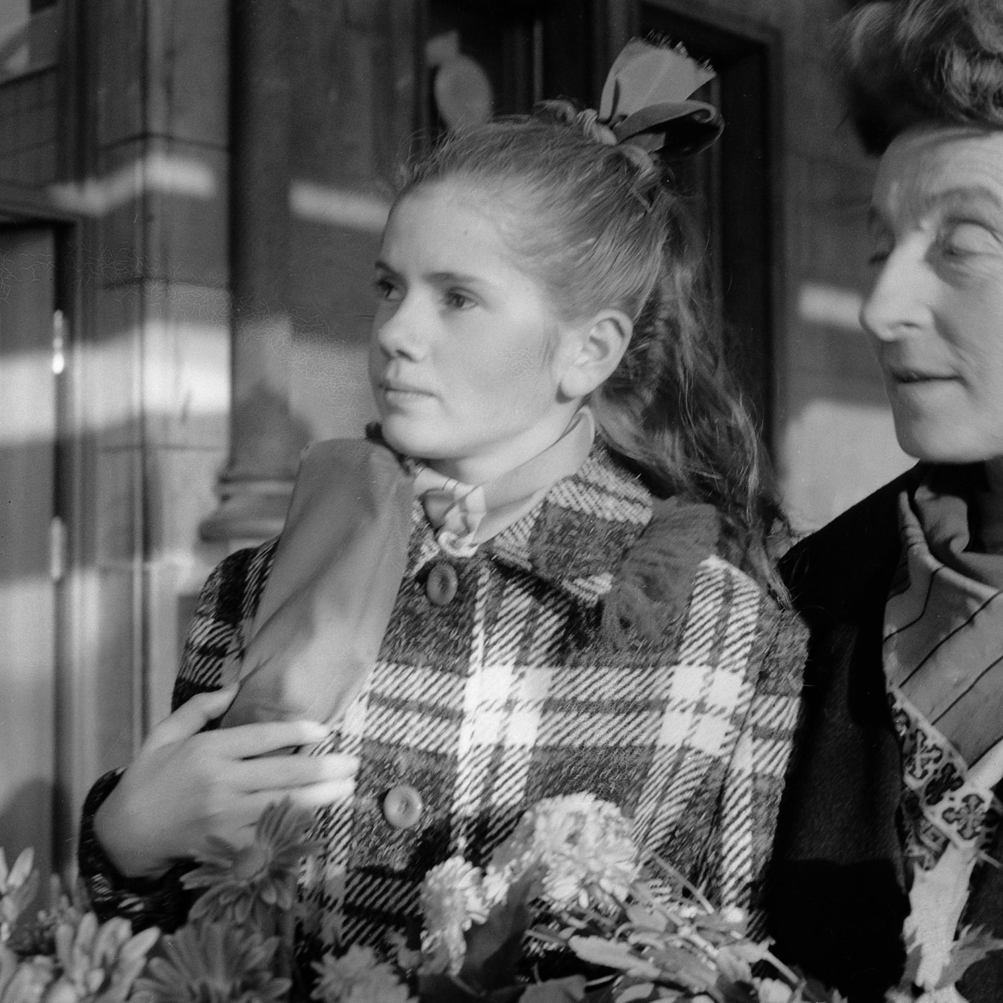 Aankomst Minou Drouet op het Centraal Station te Amsterdam, Minou Drouet en haar moeder 3 november 1960